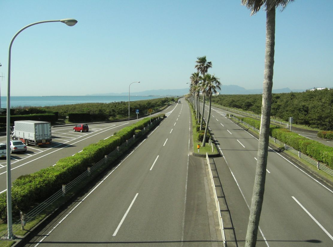 Hitotsuba-road in Miyazaki, Japan.(宮崎県の一ツ葉道路。一ツ葉PA付近。)